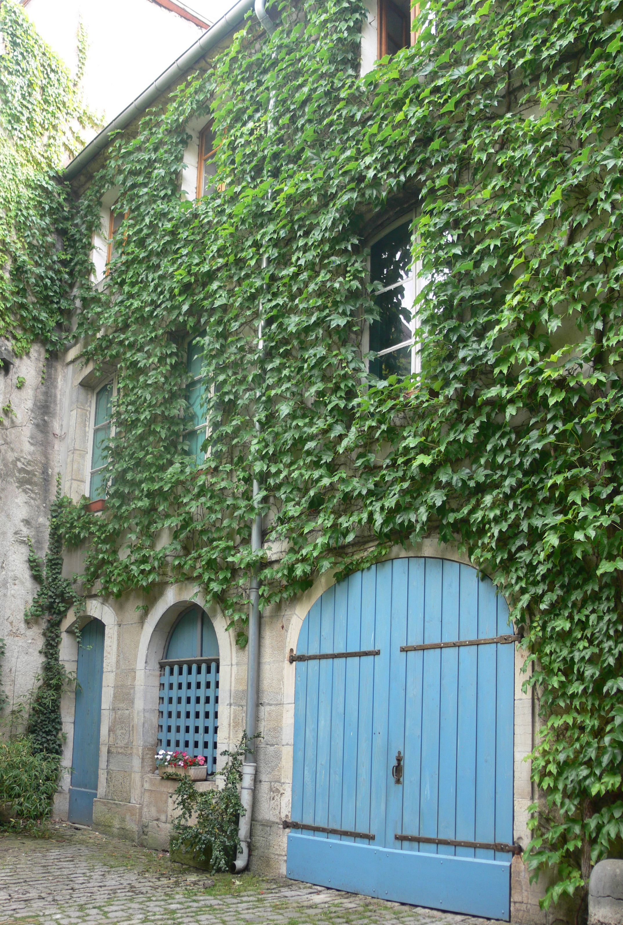 Maison du 2 rue Baron-Bouvier (Vesoul, Haute-Saône, France)